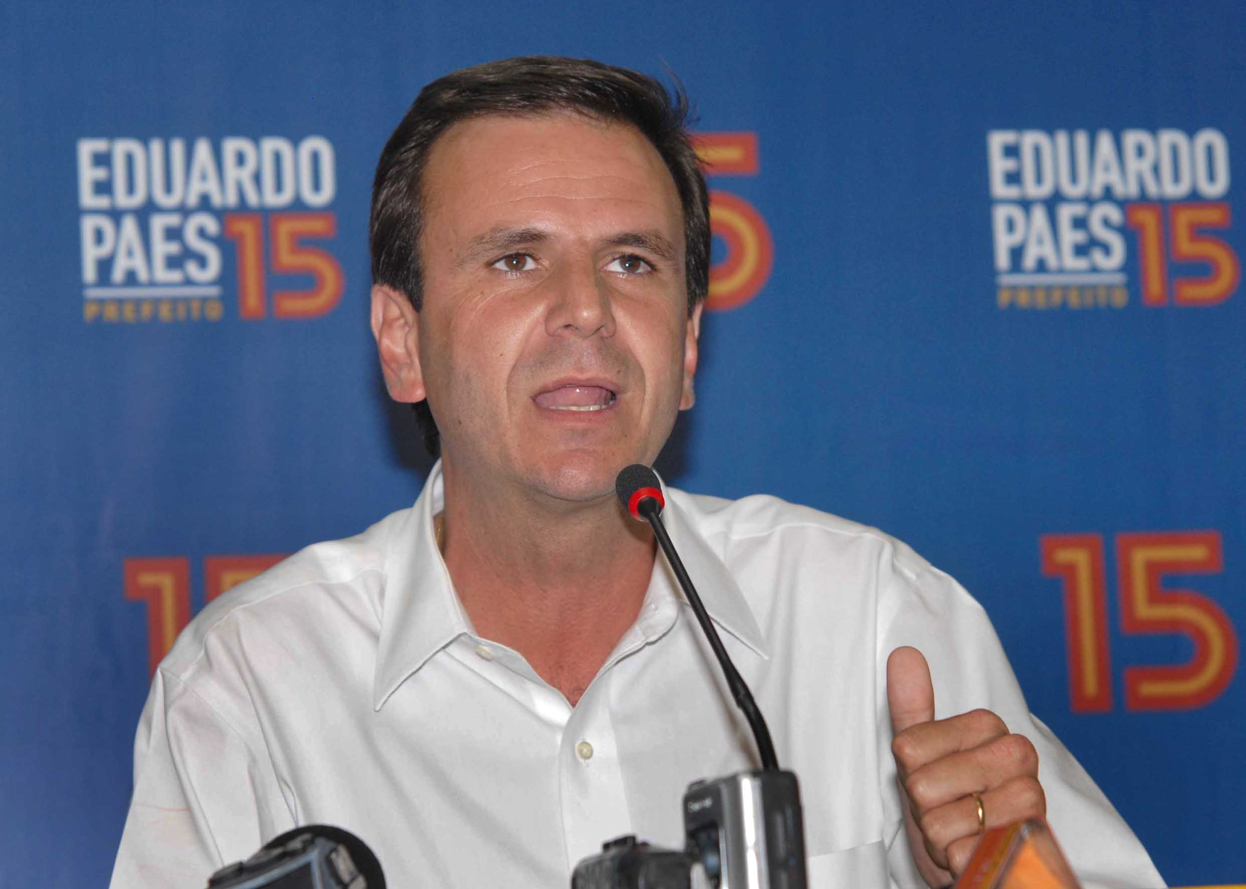 O político brasileiro Eduardo Paes (PMDB) dá entrevista após a confirmação do primeiro lugar na eleição para prefeito do Rio.